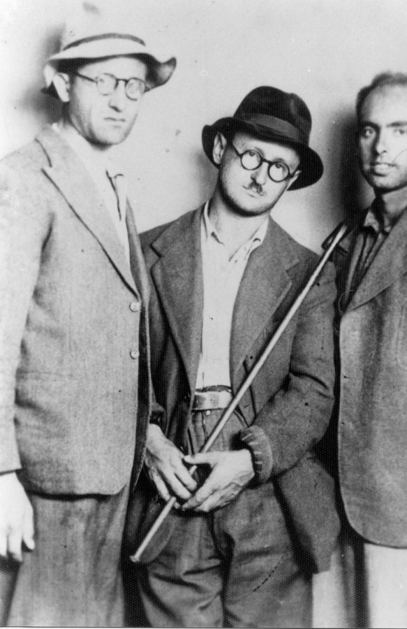 הצנחנים בשליחות לאירופה הכבושה - הצנחנים בשליחות לאירופה הכבושה - הלקח ההיסטורי - הצנחנים מחופשים בתחפושות של פליטים, כשליחי העלייה במאבק בהגבלות העלייה שהטילו הבריטים. יונה רוזן, יצחק (מנו) בן-אפרים, שייקה דן